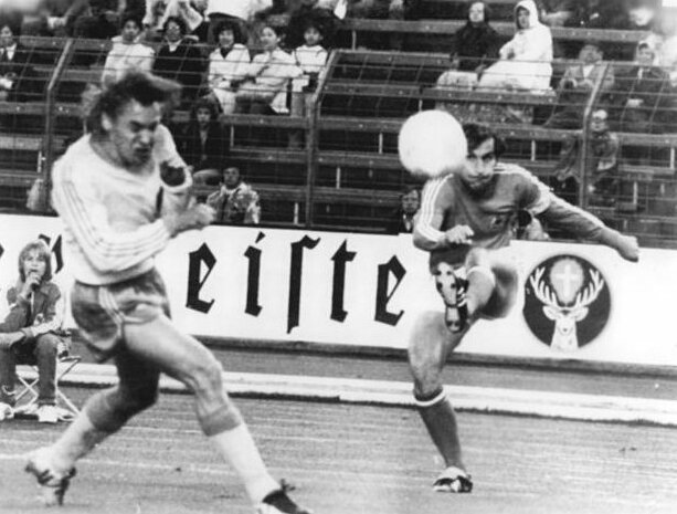 ADN-ZB-AP-Tele-3.7.74-ma-BRD-Düsseldorf: X. Fußball-Weltmeisterschaft-2. Finalrunde, Gruppe B: Schweden - Jugoslawien 2:1- Der Jugoslawe Dragan Dzajio (rechts) flankt vor das schwedische Tor. Links duckt sich Abwehrspieler Jan Olsson (Schweden).